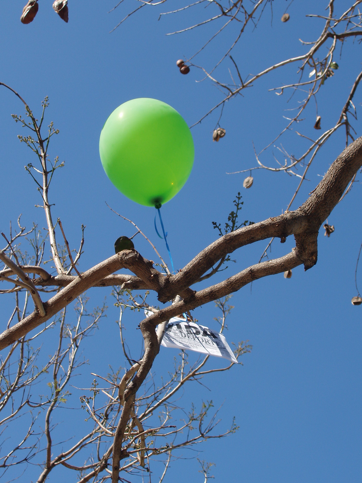 Un niño perdió su globo y se enganchó en el árbol :)